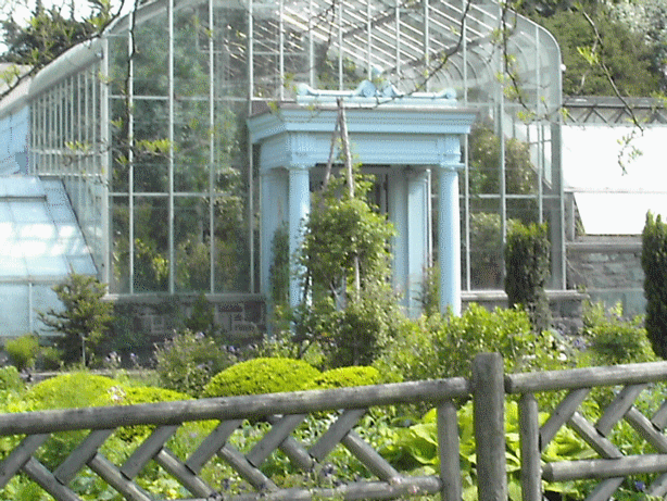 Wave Hill (Photo d'Olivier Perrin)